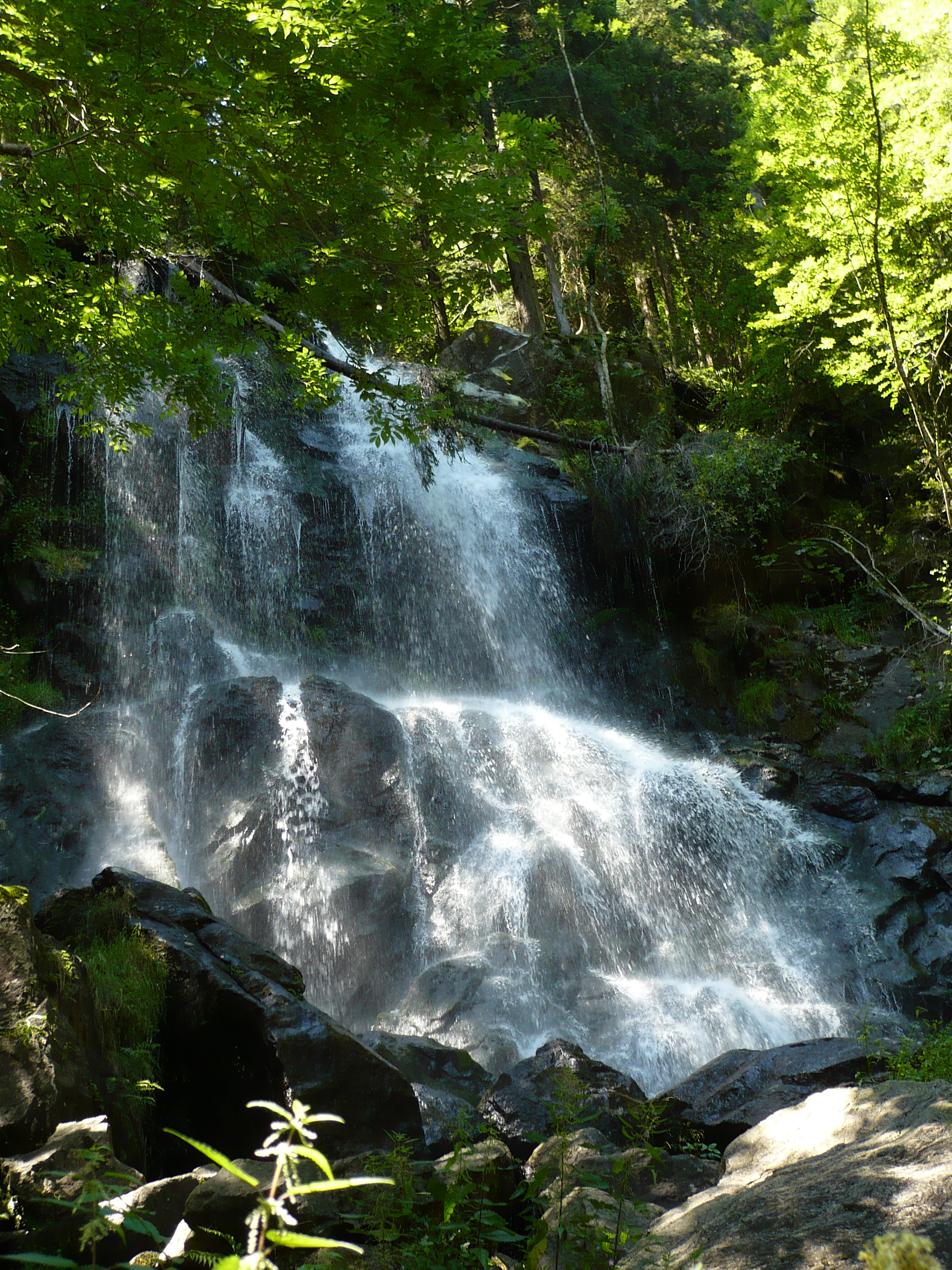 Oberer Wasserfall der Zweribachwasserfälle